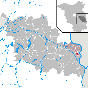 Vogelsang in Brandenburg (Country) - District Oder-Spree